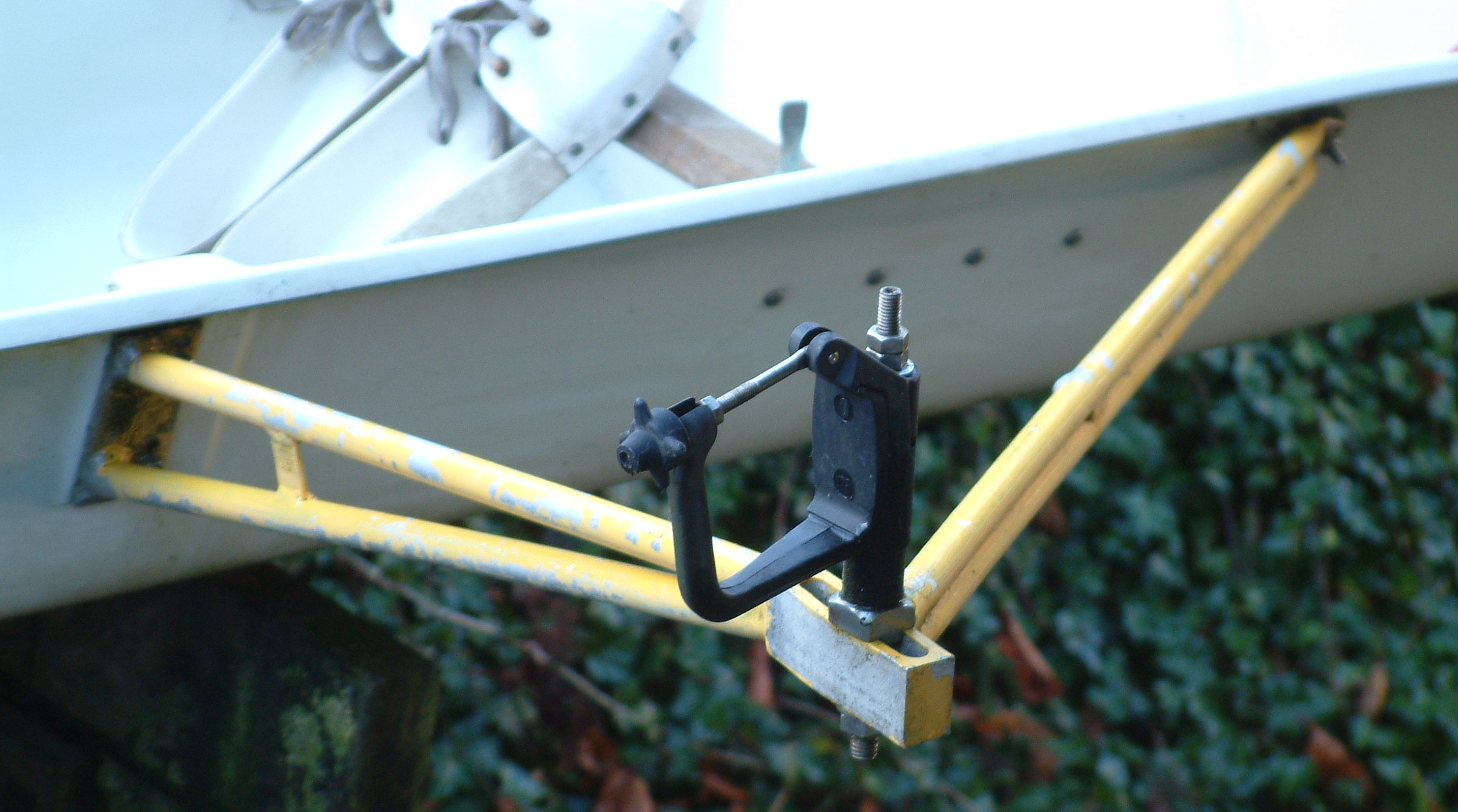 Rigger met dol Categorie:Roeien